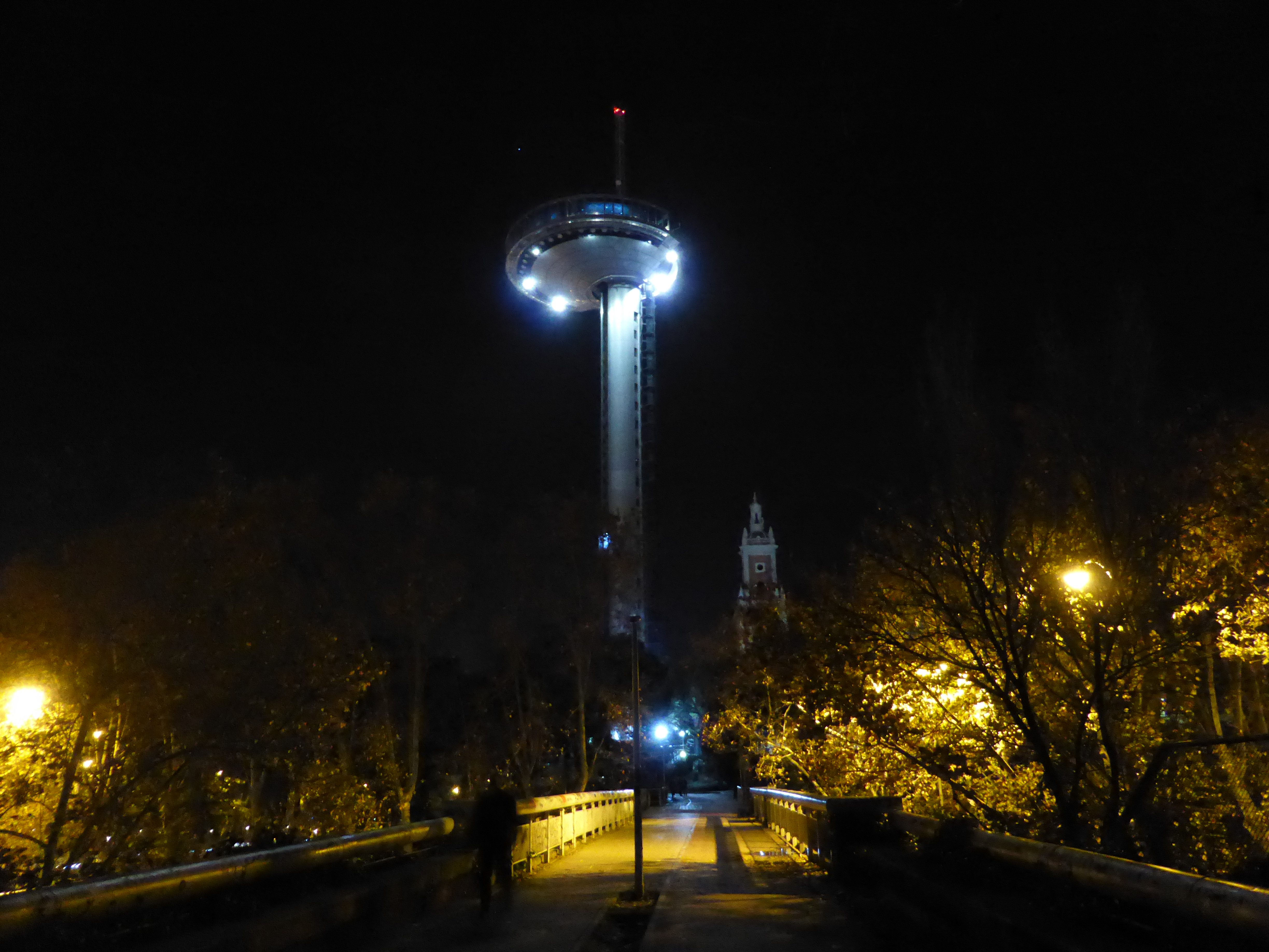 El "Faro de Moncloa" visto de noche. Es una torre de iluminación, con mirador a 92 metros de altura.